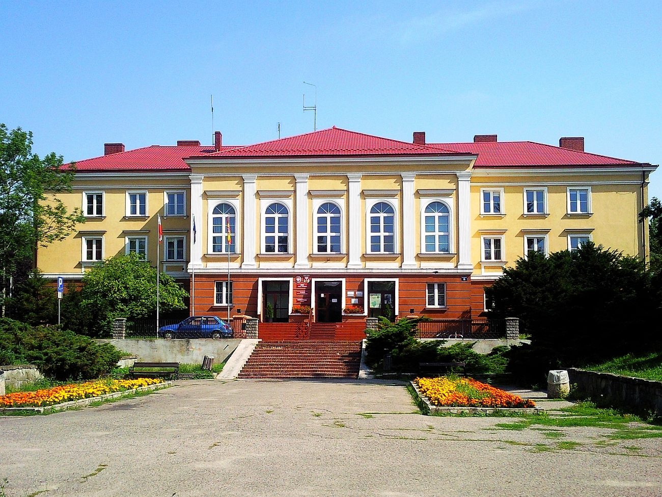 Starostwo Powiatowe w Będzinie przy ulicy Sączewskiego